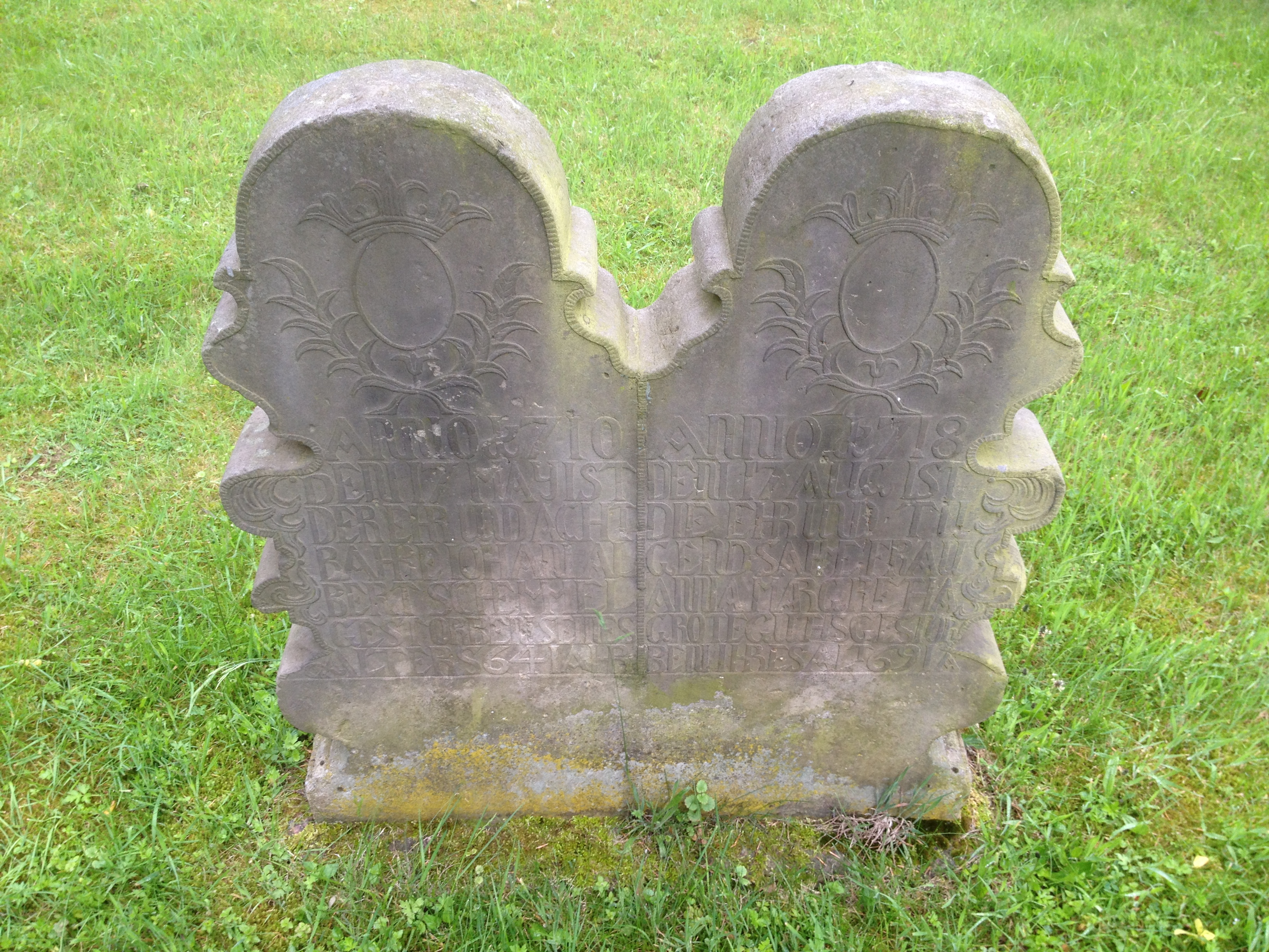 Deutschland - Nordrhein-Westfalen - Bad Salzuflen - Wüsten: Grabsteine bei der Evangelischen Kirche